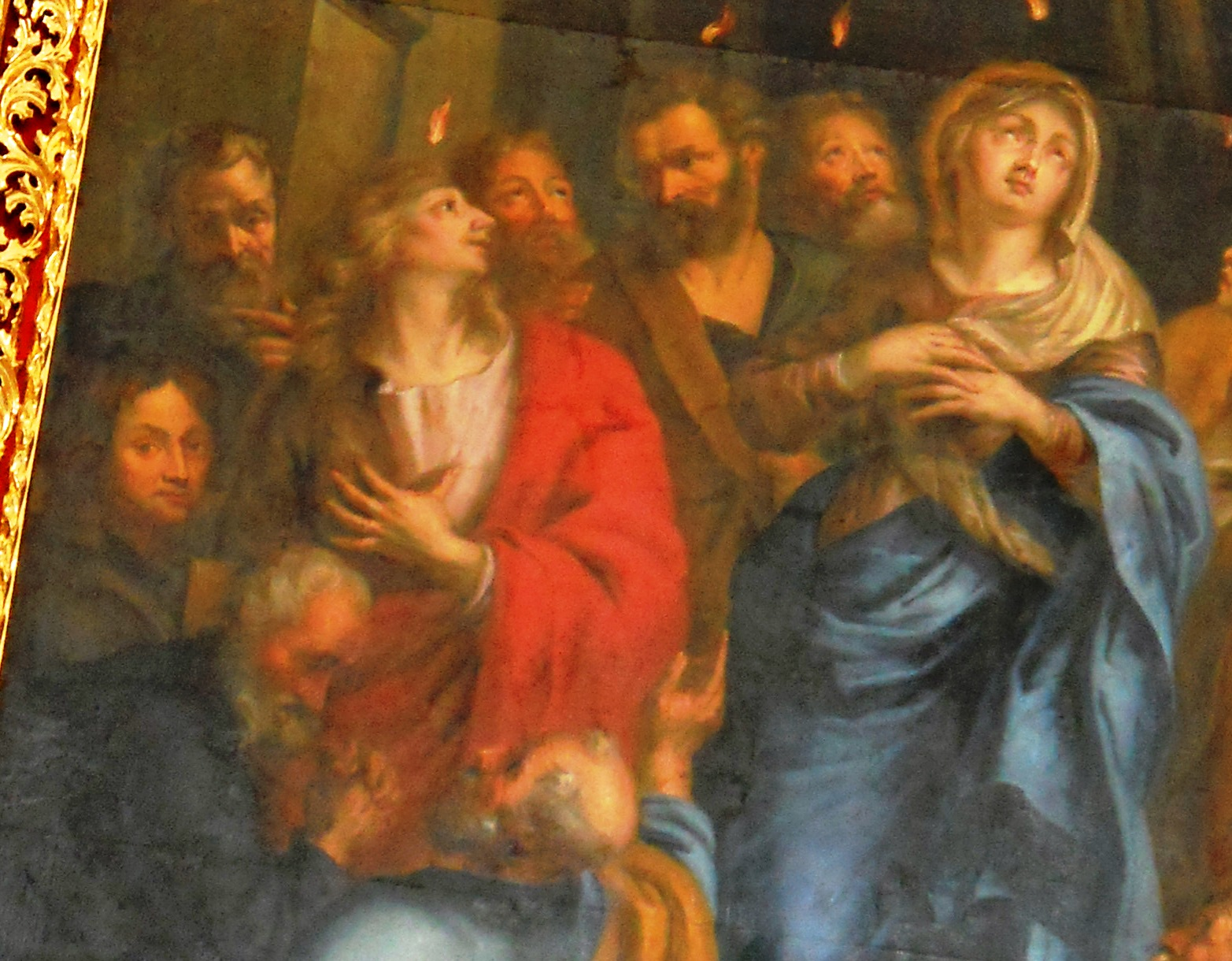 Gemälde des Choraltars (Oberbayern) mit Selbstbildnis des Malers